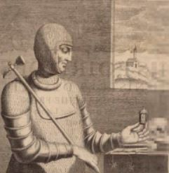 gravure ancienne représentant Geoffroy II d'Anjou (1006-1060), dit de Martel, comte d'Anjou.